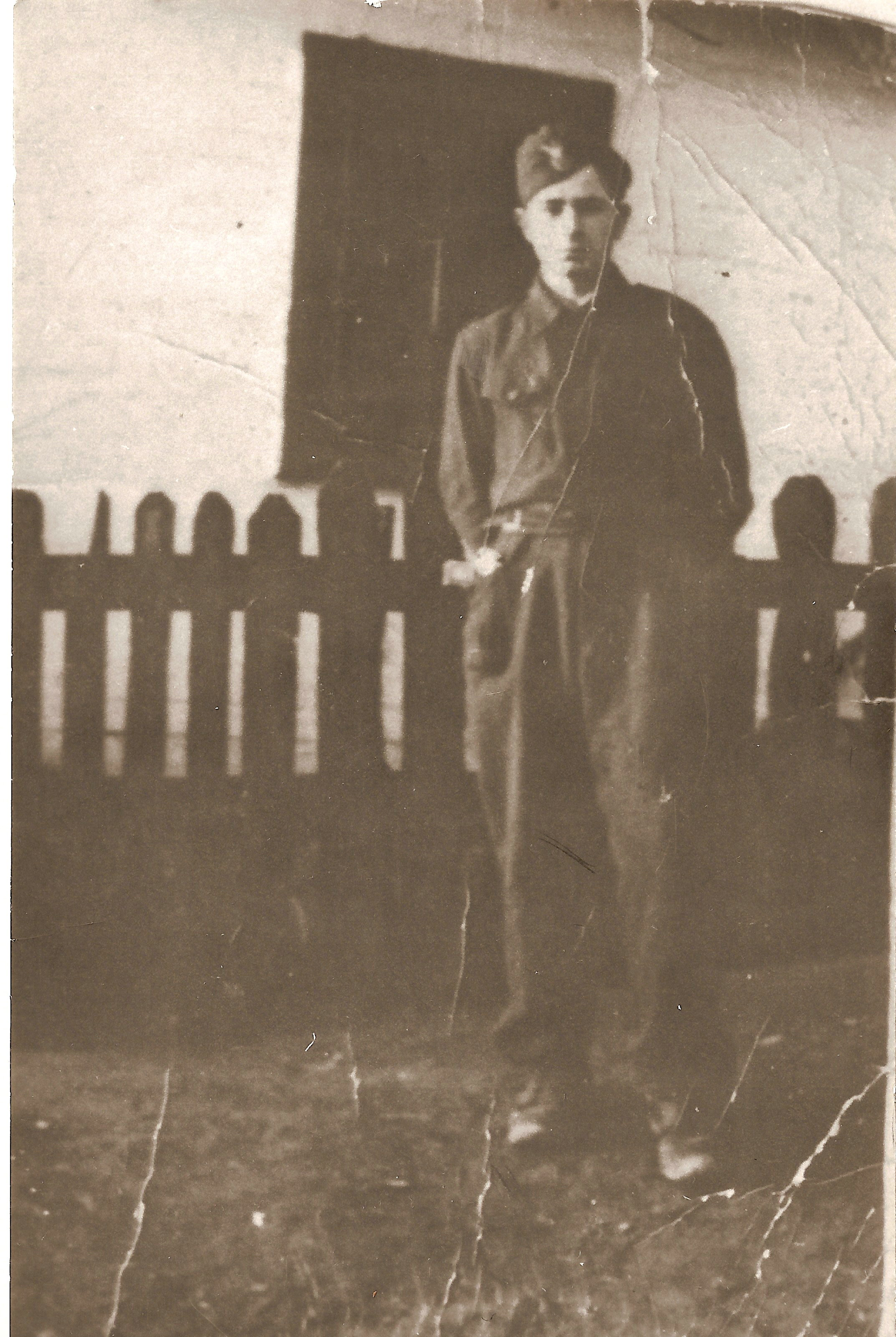 Żołnierz Oddziału Leśnego "Lech" - Pantera